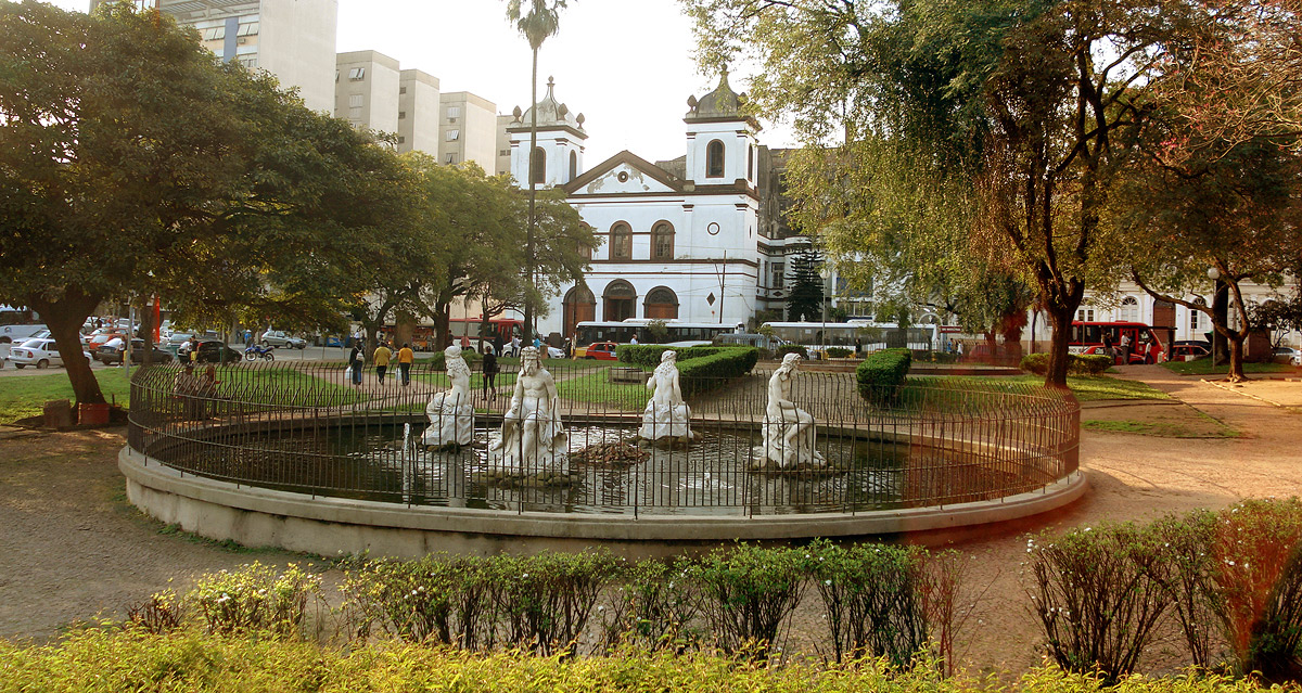 Vista parcial da Praça Dom Sebastião, em Porto Alegre, Brasil, com a Igreja da Conceição ao fundo